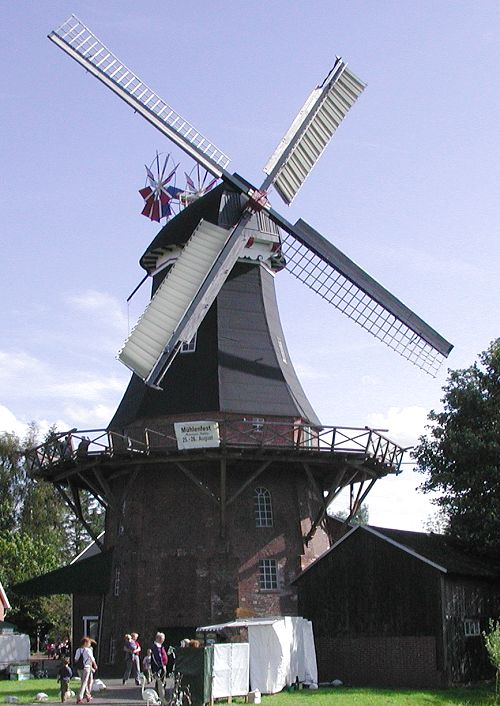 Galerieholländer-Windmühle in Nordenham-Moorsee mit einer doppelten Windrose (angemalt in des Farben des Oldenburger Landes)